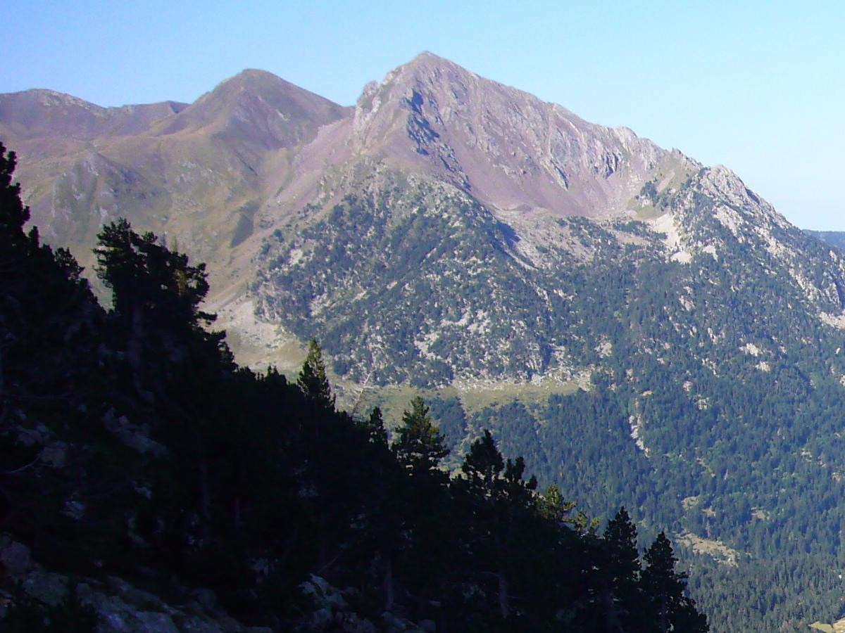 Bony Blanc i Cometa de la Qüestió, vistos des del camí de l'Estany Llong a Dellui; la Vall de Boí, Alta Ribagorça, Catalunya